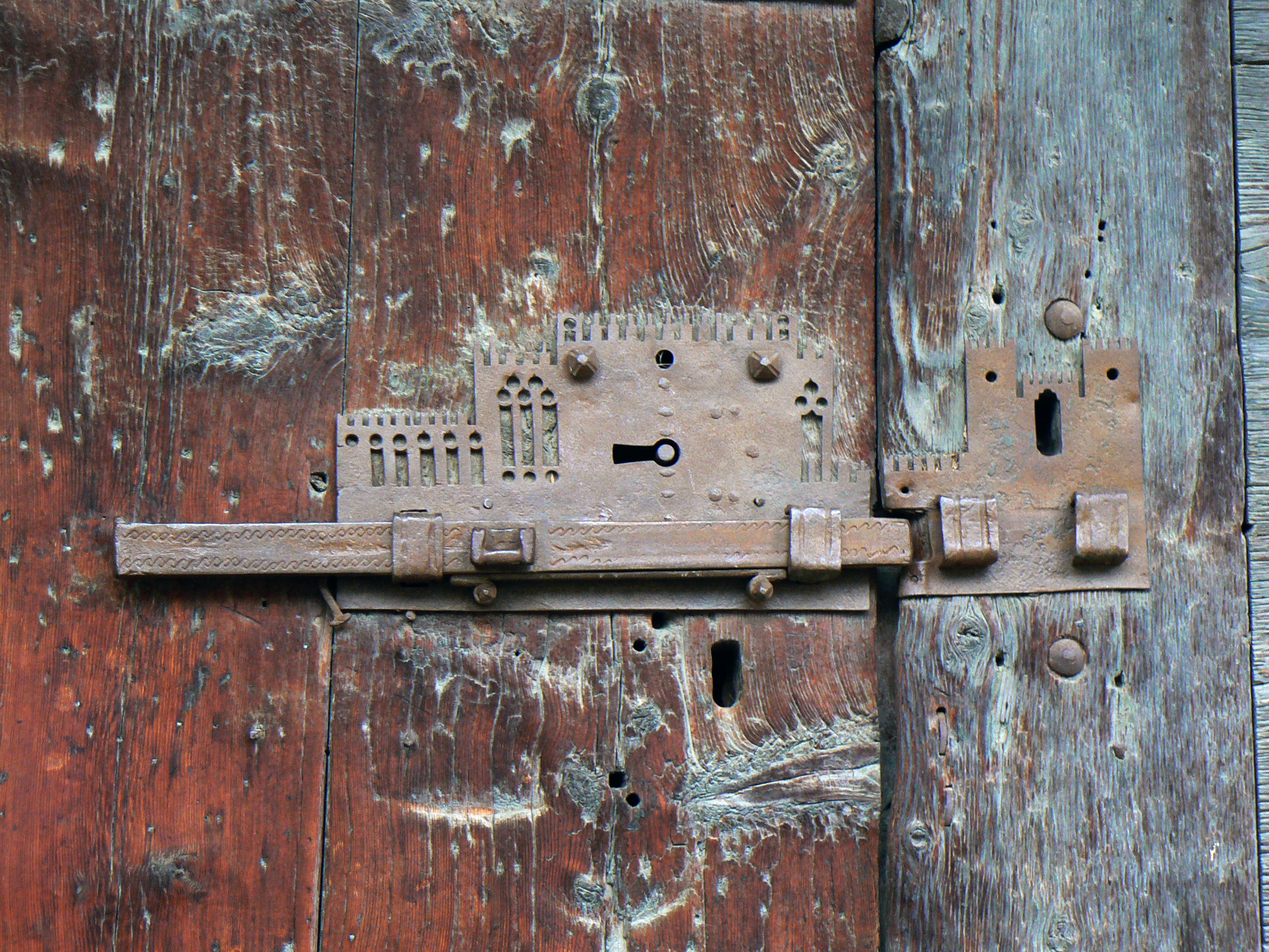 Serratura del granaio che richiama la figura di un castello. Castello di Introd, Introd, Valle d'Aosta, Italia. This is a photo of a monument which is part of cultural heritage of Italy.